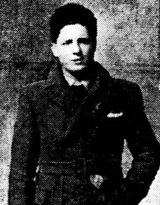 "Paul Colette" [sic].